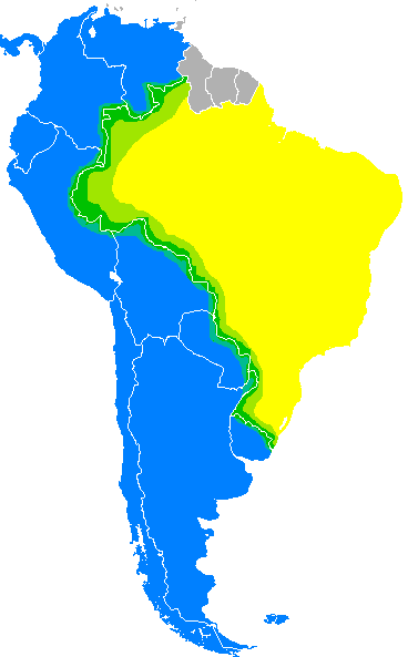 Dialecto transicional - lengua mixta Portuñol en Suramérica